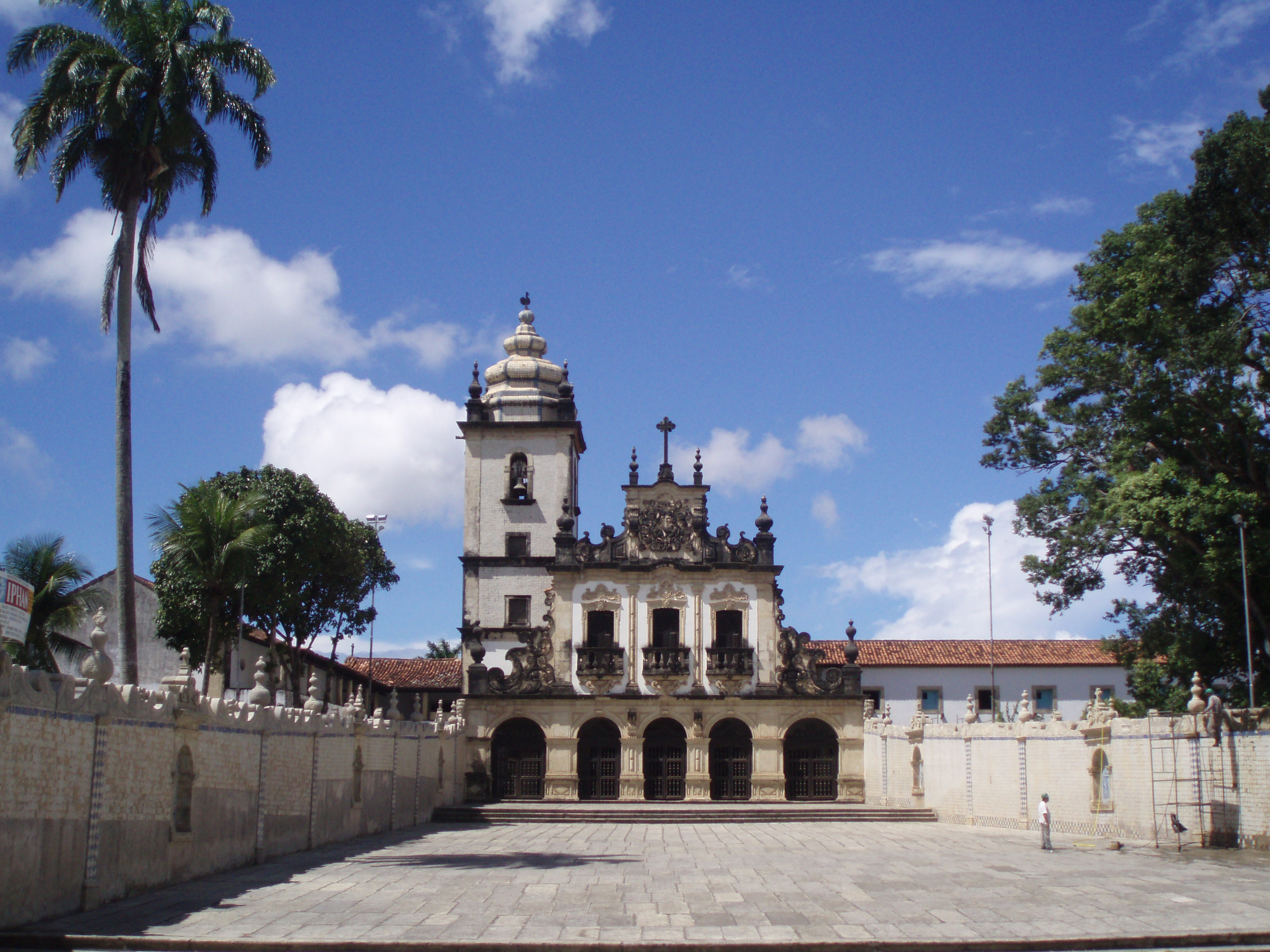 Brasil, João Pessoa, vista do Convento São Francisco no centro historico da cidade